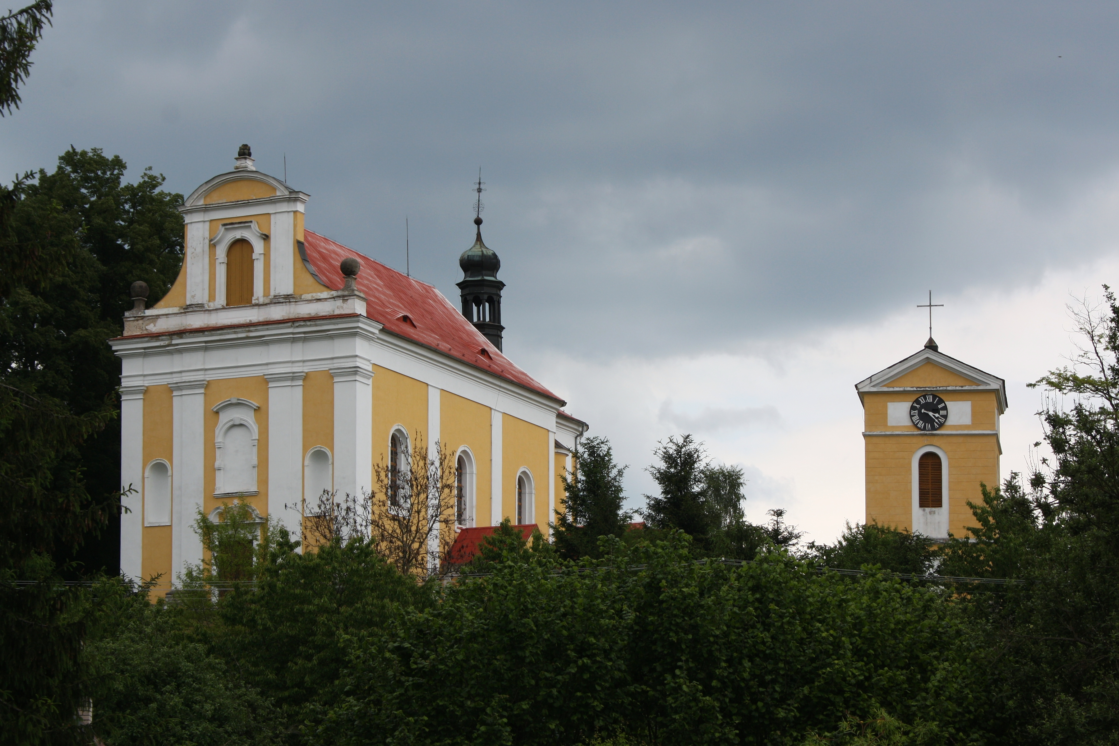 Kostel svatého Havla v Tuhani, okres Česká Lípa